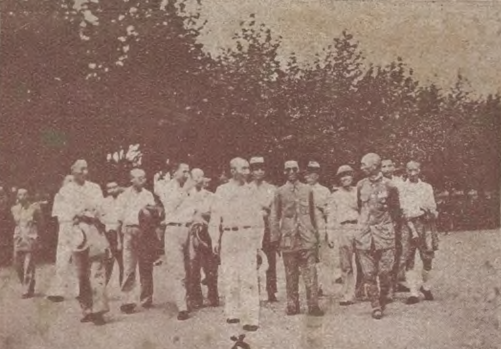 题名： 川建廳廳长盧作孚氏来碚视察:[照片] 文献来源： 《北碚月刊》 出版时间： 1937 年 卷期(页)： [ 第1卷 第12期 ，封四页 ]